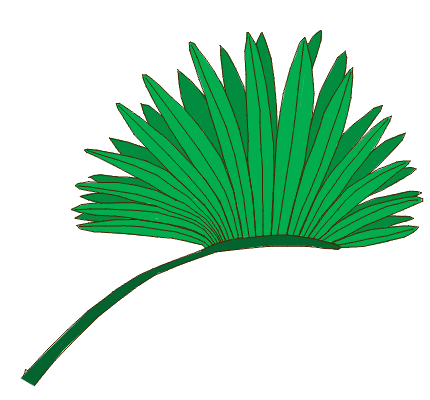 Morfología de la hoja. Tipo: costa-palmada. Según Simpson (2005) Plant Systematics.